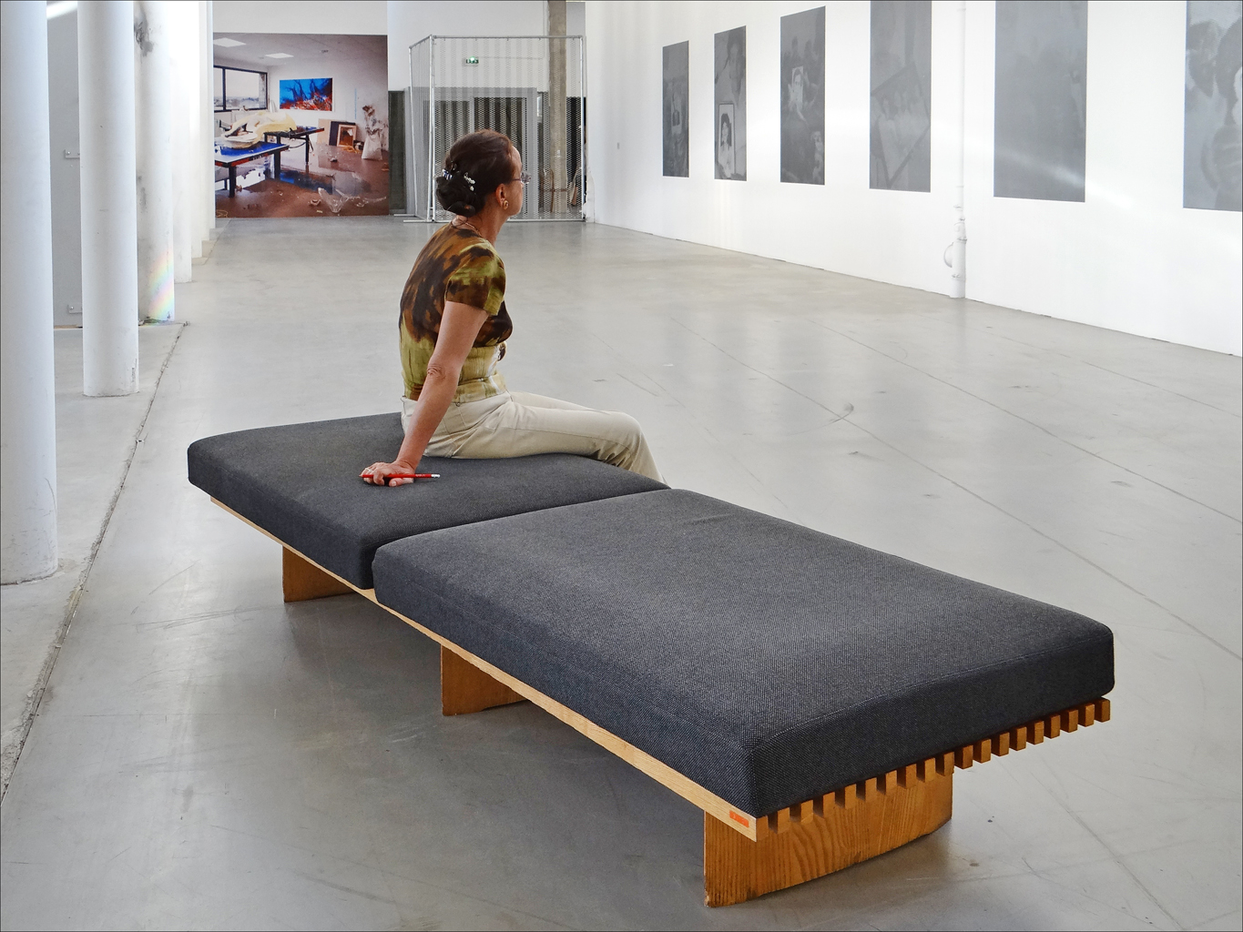 Le niveau bas du Palais de Tokyo durant la Triennale 2012, avec au premier plan la banquette Tôkyô de Charlotte Perriand (1903-1999) L'agence Lacaton et Vassal a conçu l'installation (d'abord en 2000 puis l'extension en 2012) du Palais de Tokyo dans le bâtiment créé en 1937 pour servir de musée national d'art moderne, à l'occasion de l'exposition internationale. L'autre bâtiment du site héberge le musée d'art moderne de la ville de Paris. Site de l'agence Site du palais de Tokyo __________________ Charlotte Perriand a créé cette banquette pour l'exposition "La synthèse des arts" qu'elle a organisée à Tokyo en avril 1955 dans le grand magasin Takashimaya. Le Corbusier et Fernand Léger ont participé à cette manifestation. Cette banquette, inspirée du dessin d'un squelette de poisson, a ensuite été commercialisée. En 1963, 40 exemplaires de la banquette Tôkyô ont été commandés par Maurice Besset pour le musée national d'art moderne qui se trouvait en ces lieux. Au cours des années, ces banquettes ont été déplacées dans d'autres musées, ont disparu ou ont été détruites. Au palais de Tokyo, il ne reste que celle photographiée et qui est inventoriée comme le montre le numéro orangé visible sur l'image. La banquette Tôkyô n'exprime rien d'autre qu'un état de pure et silencieuse contemplation (sources : document du Palais de Tokyo sur la banquette devenue objet de la collection du palais)